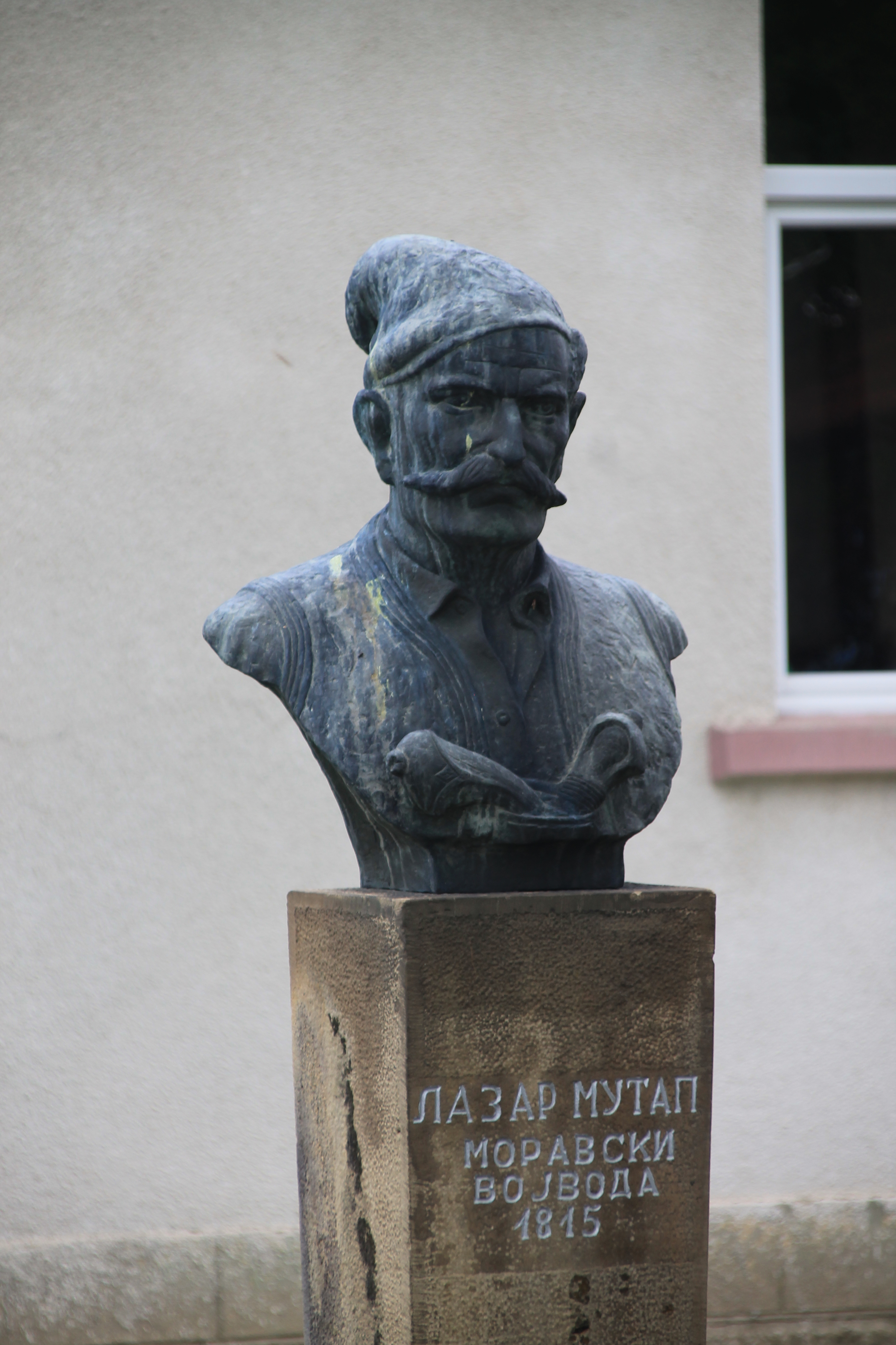 Prislonica